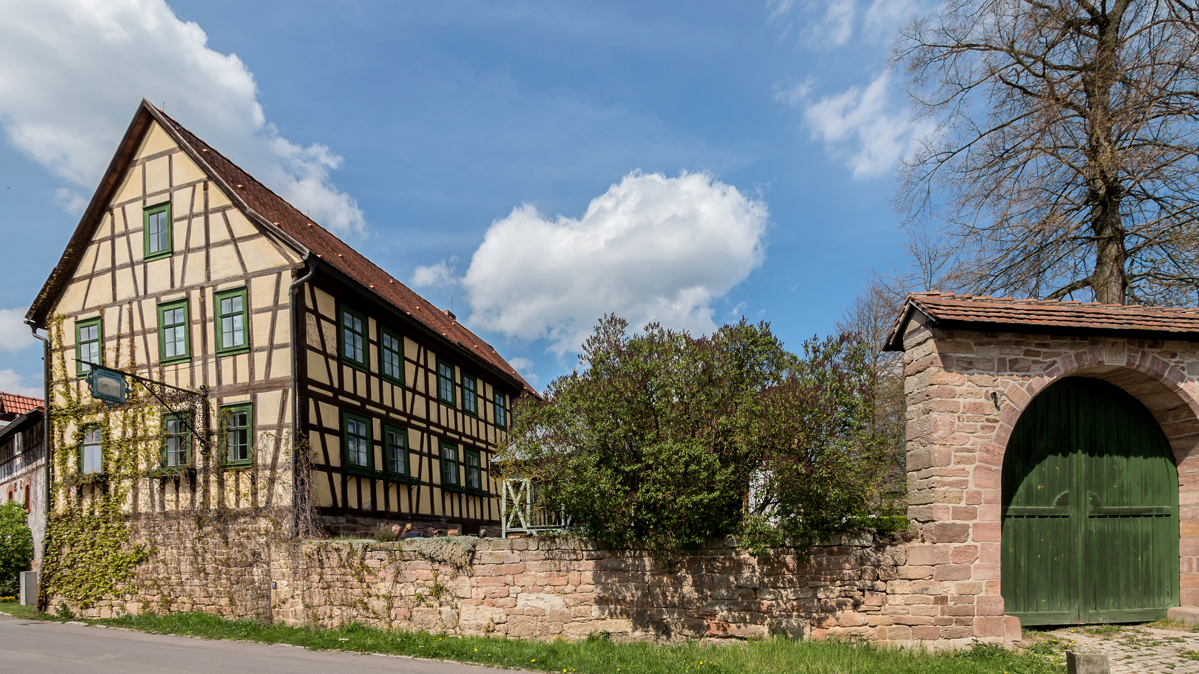 Hohenfelden Hohenfelden Dorfstraße 16 ehemaliges Pfarrhaus Museum